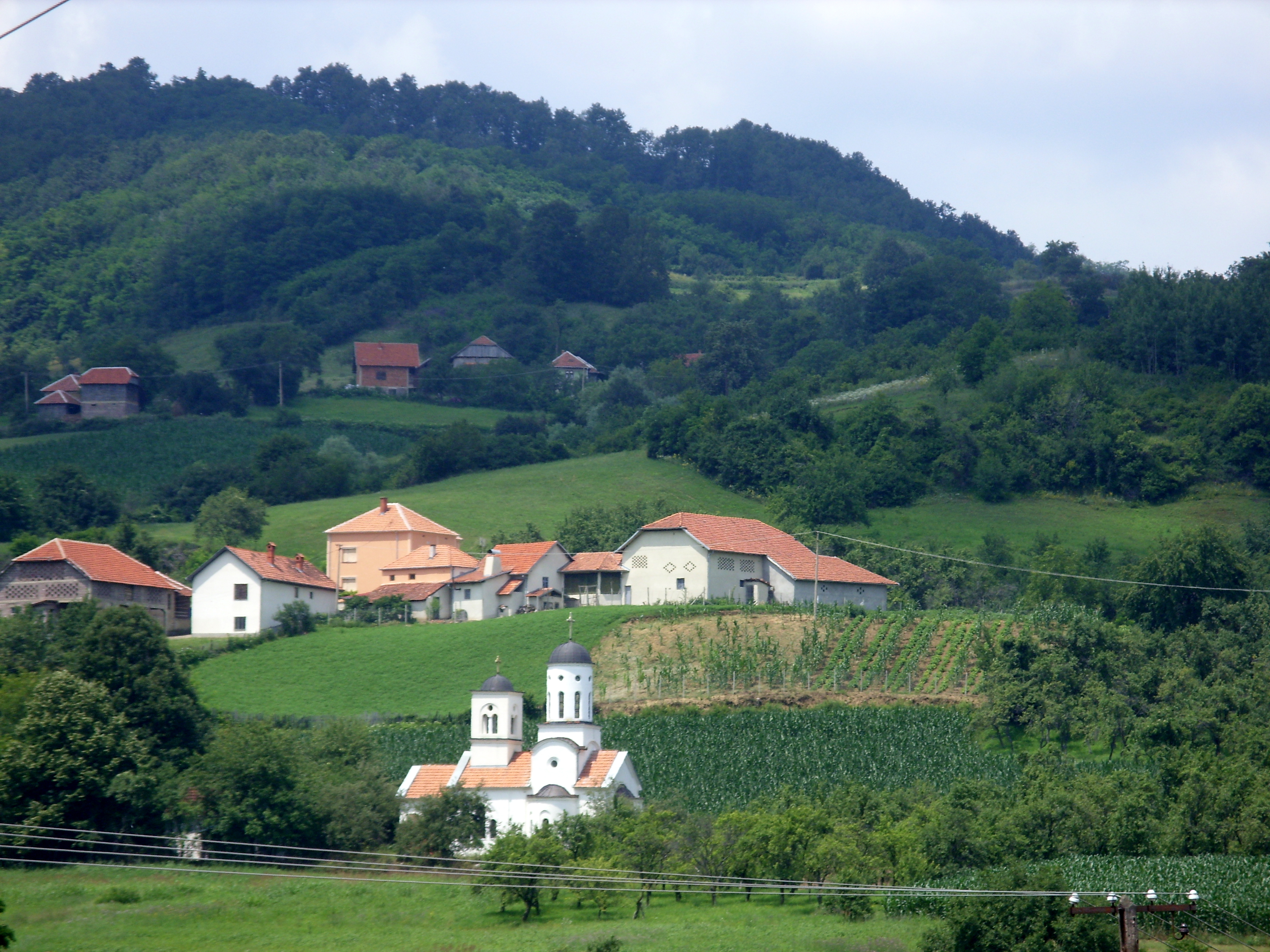 village Vukanja, municipalité d'Aleksinac, Serbie